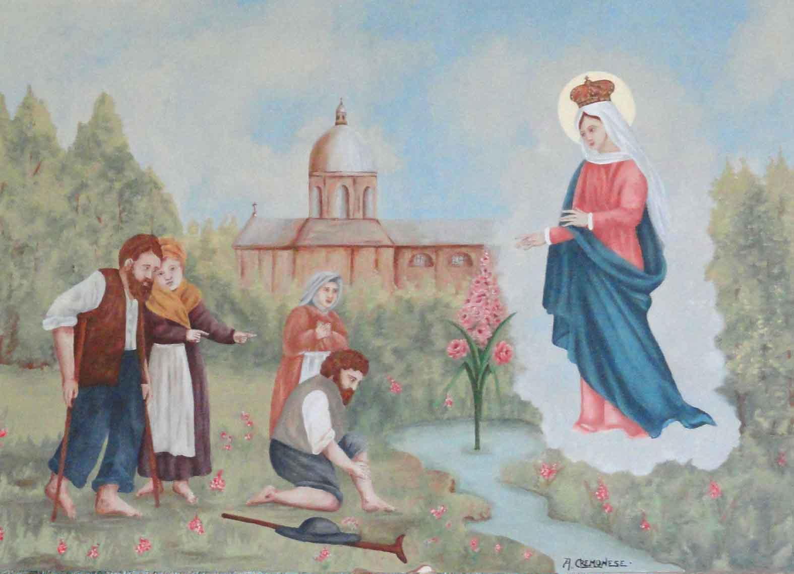 Pintura mural com cena de cura milagrosa por intervenção da Virgem de Caravaggio. Capela-mor da antiga Matriz de Caravaggio, Farroupilha, Brasil. Depois do restauro desastroso